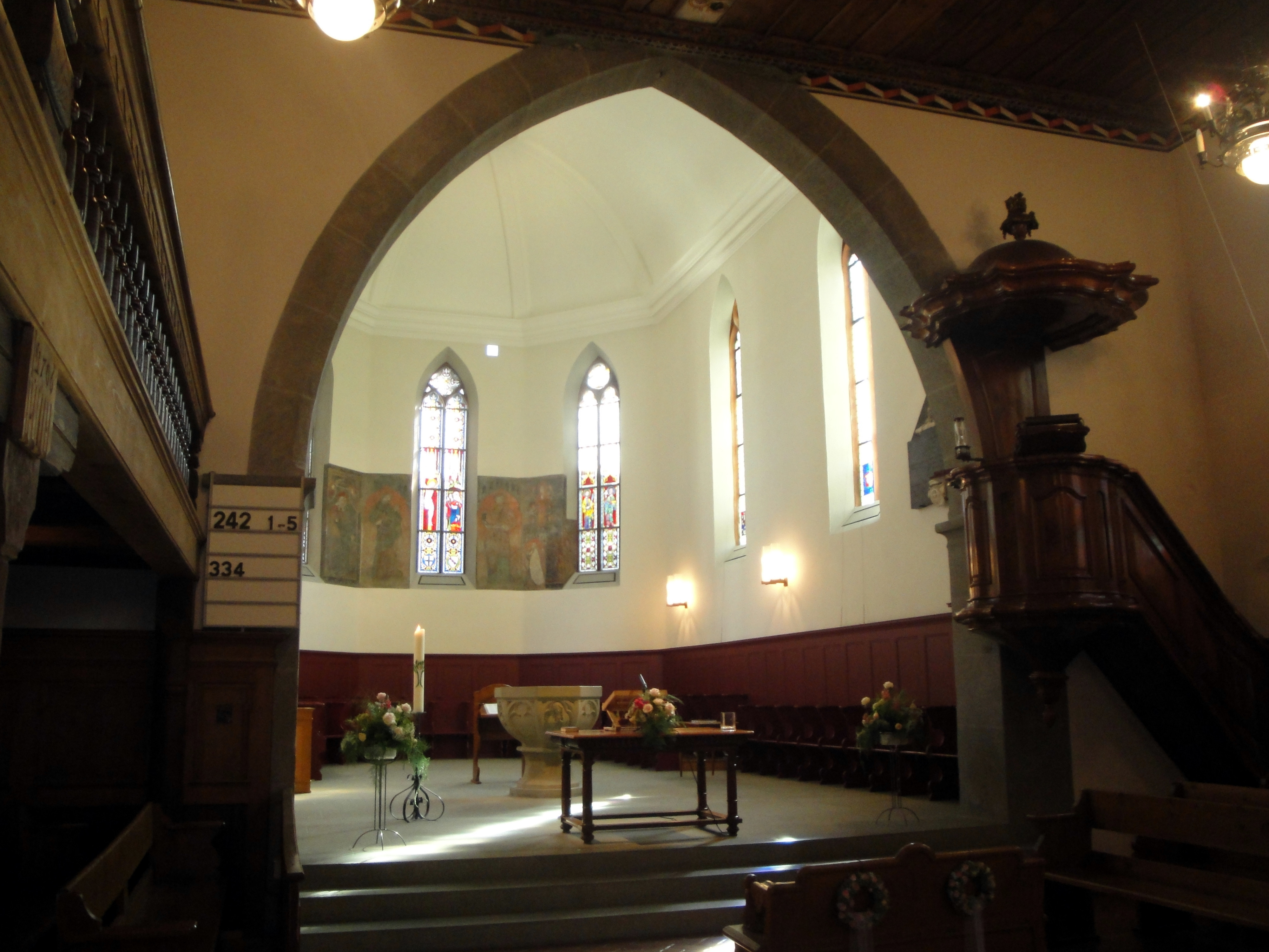 Köniz, Kirche der ehemaligen Komturei, Blick auf den Altar, Kanzel von Mathäus Funk.